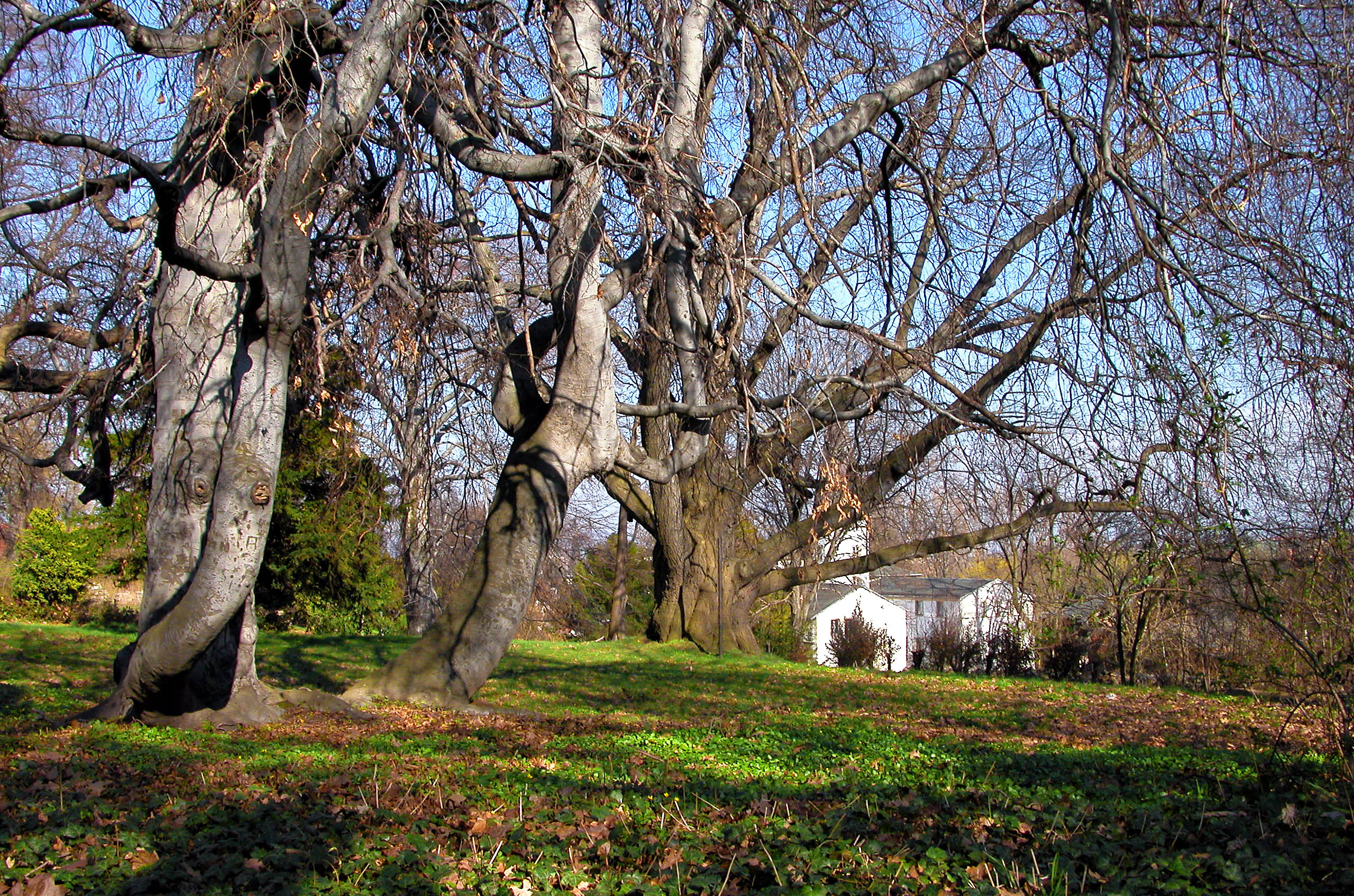 11.04.2005 01728 Nöthnitz (Bannewitz): Schloßpark Nöthnitz. Im Hintergrund das Schloß (GMP 51.003903,13.730490)aus der Renaissance, in der 1. Hälfte des 17. Jahrhunderts umgebaut. Der russische Zar und Marschall Moreau gehörten zu den Quartiergästen. Unter Heinrich Graf von Bünau fungierte der Kunstgelehrte und Begründer der klassischen Archäologie Johann Joachim Winckelmann von 1748 bis 1754 als Bibliothekar. Sicht von Westen. [DSCN6308.TIF]20050411045DR.JPG(c)Blobelt